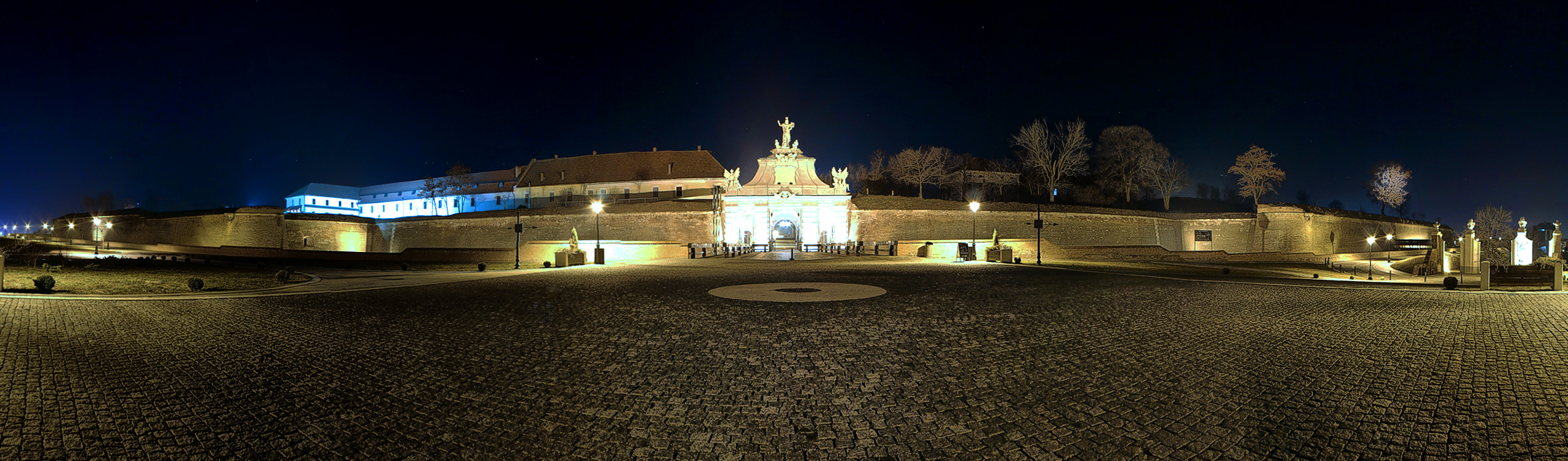 Poarta III, vedere exterioară panoramică, Alba Iulia, România